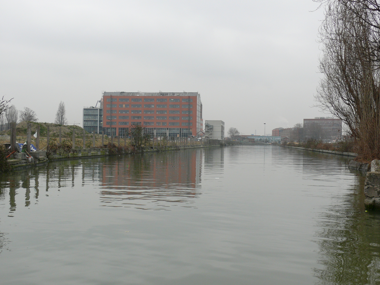 La darse de la Charbonnière du Canal Saint-Denis à Aubervilliers, est en cours de réurbanisation dans le cadre de la ZAC de la Porte d'Aubervilliers